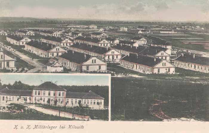 Truppenlager in Milowitz